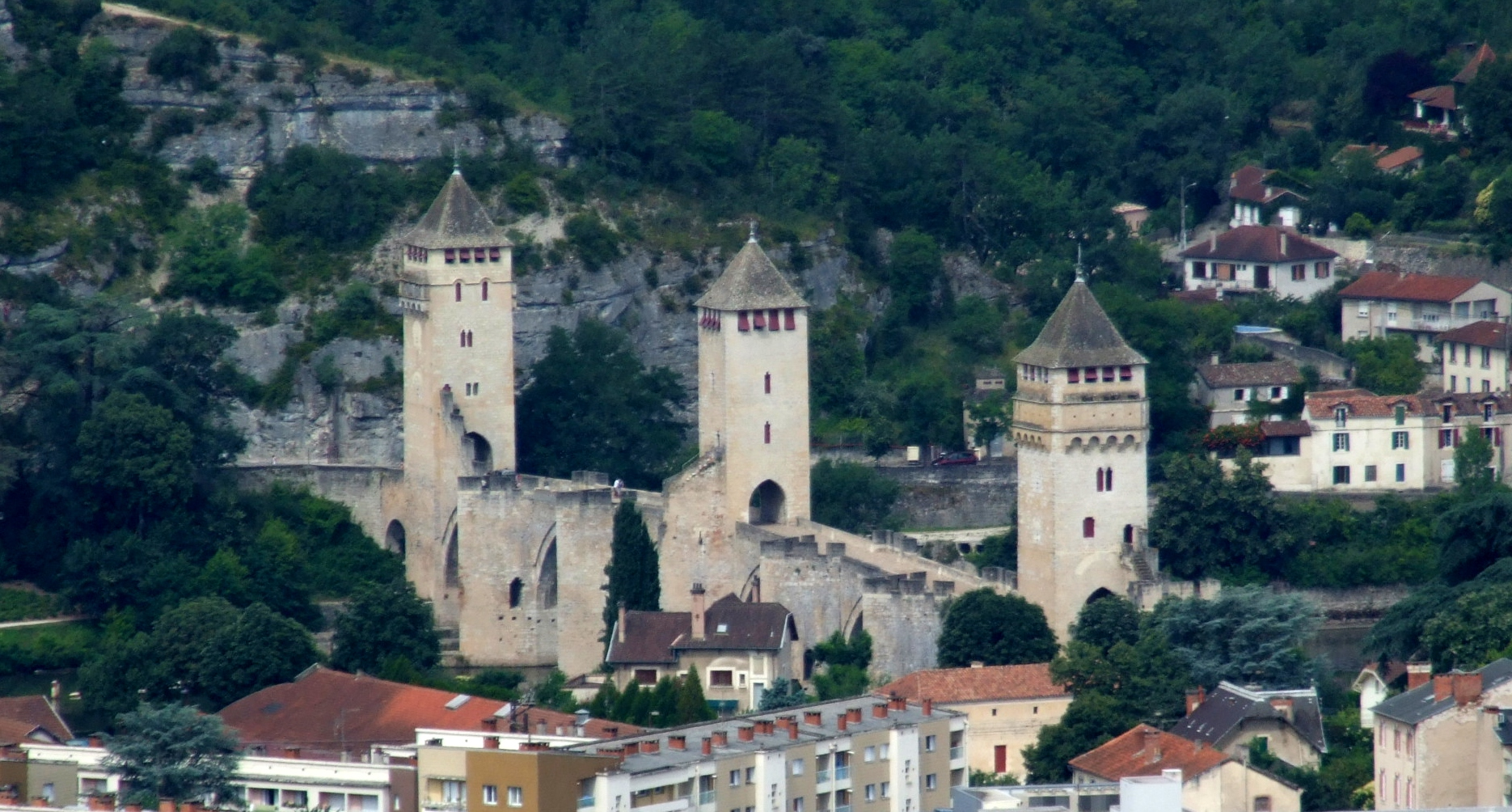 Pont Valentré, Cahors, Lot, FRANCE